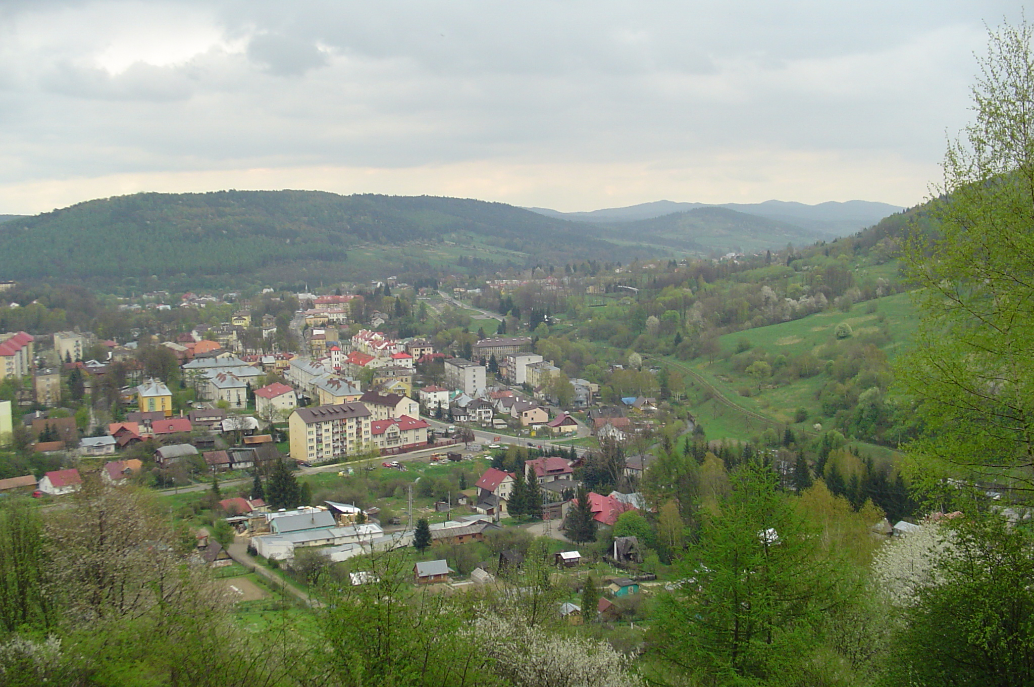 Ustrzyki Dolne, Panorama Wiosna 2